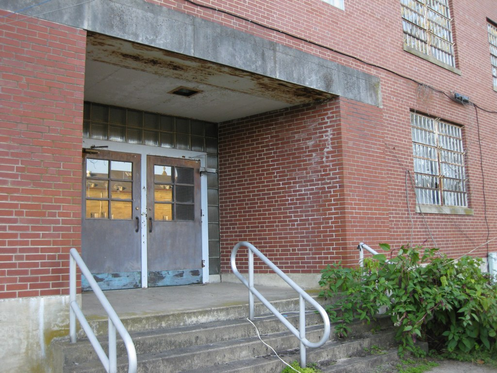 Vacant Geriatrics Facility